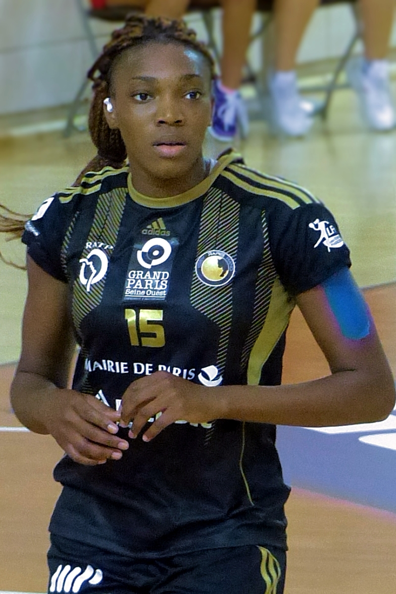 Kalidiatou Niakaté arrière gauche du club Issy Paris Hand lors du match Issy Paris Hand/Mios Biganos Bègles le 14 septembre 2014.